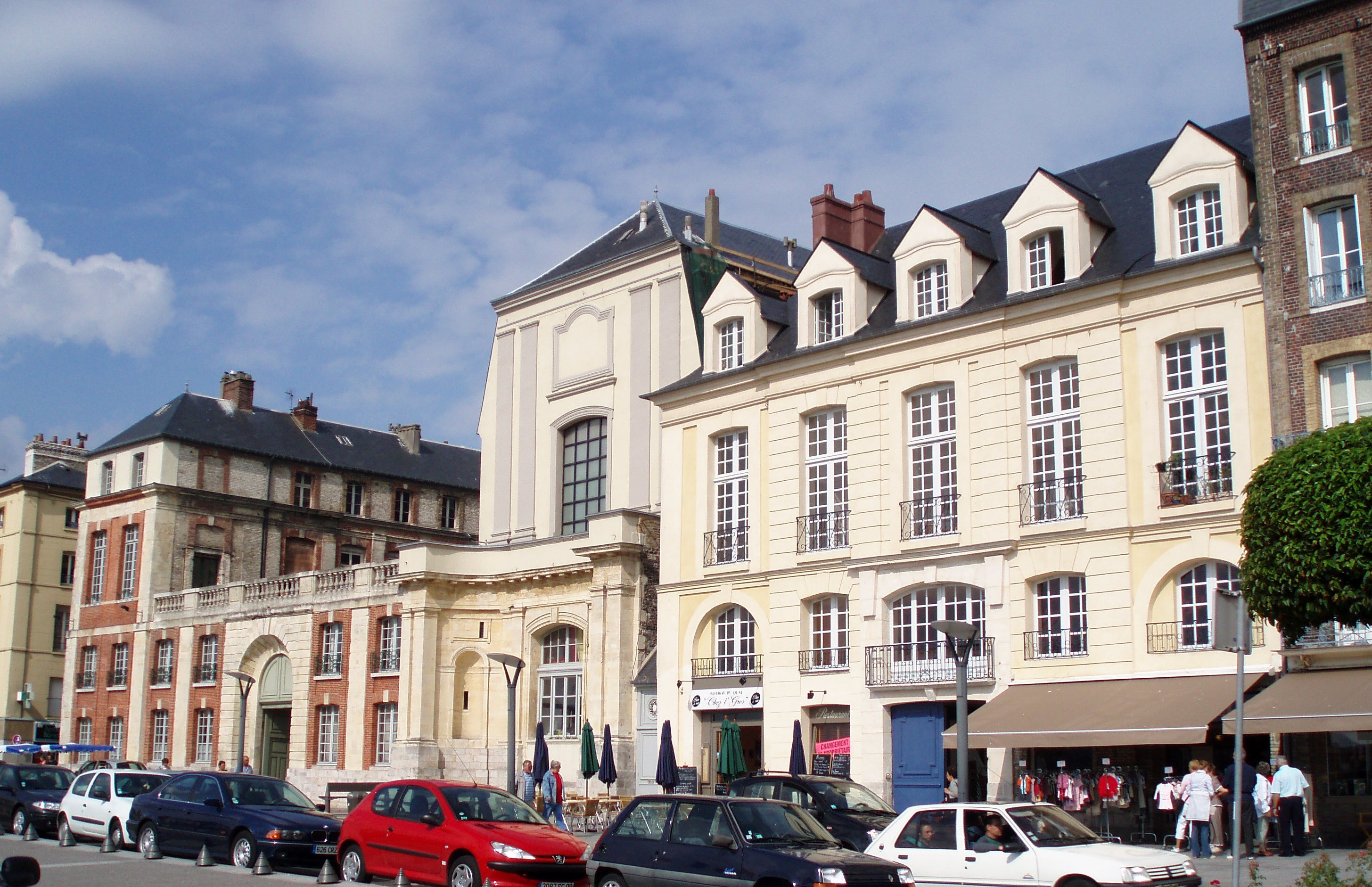 Auteur de la photographie : FC Georgio Lieu : Dieppe Année 2006